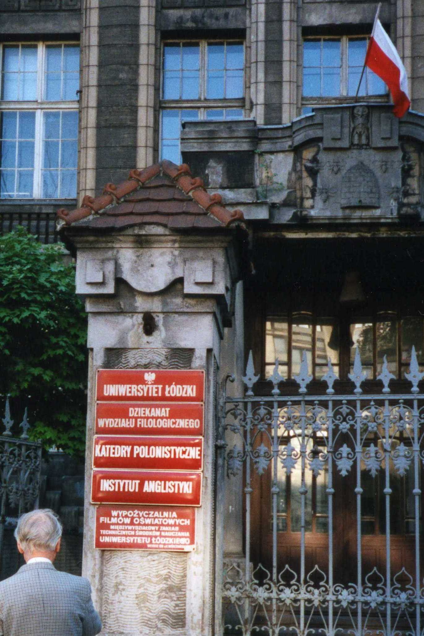 Eingang der Universität Lodz mit den im ehemaligen LDG-Gebäude beheimateten Fakultäten